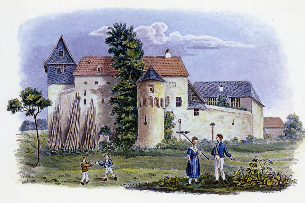 Hof Goldstein bei Schwanheim, 1832